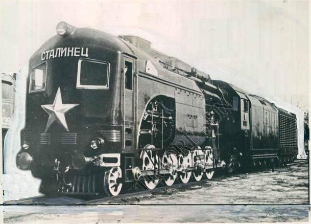 Теплопаровоз серии ТП1